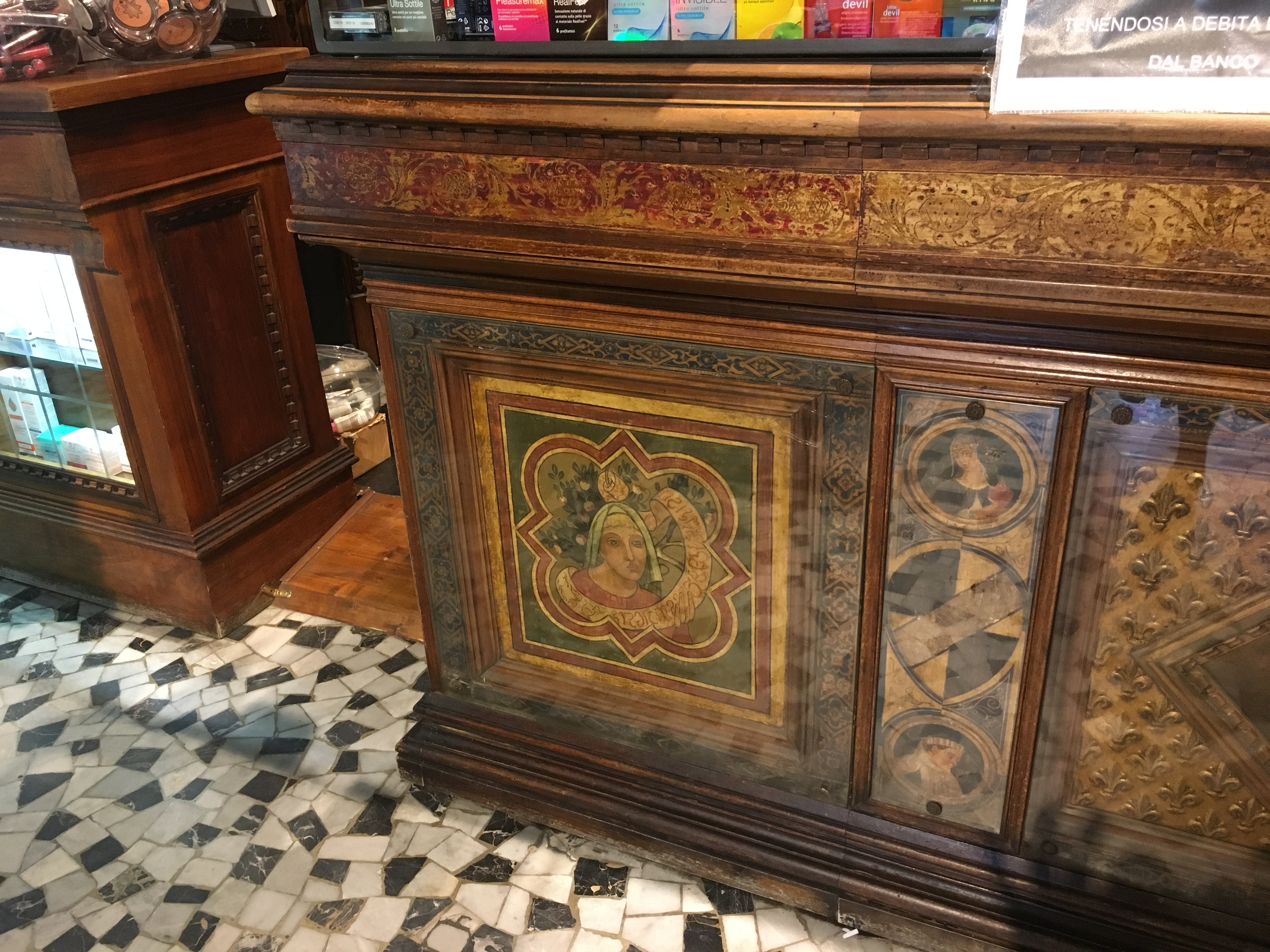 Farmacia del Canto alle Rondini. Firenze